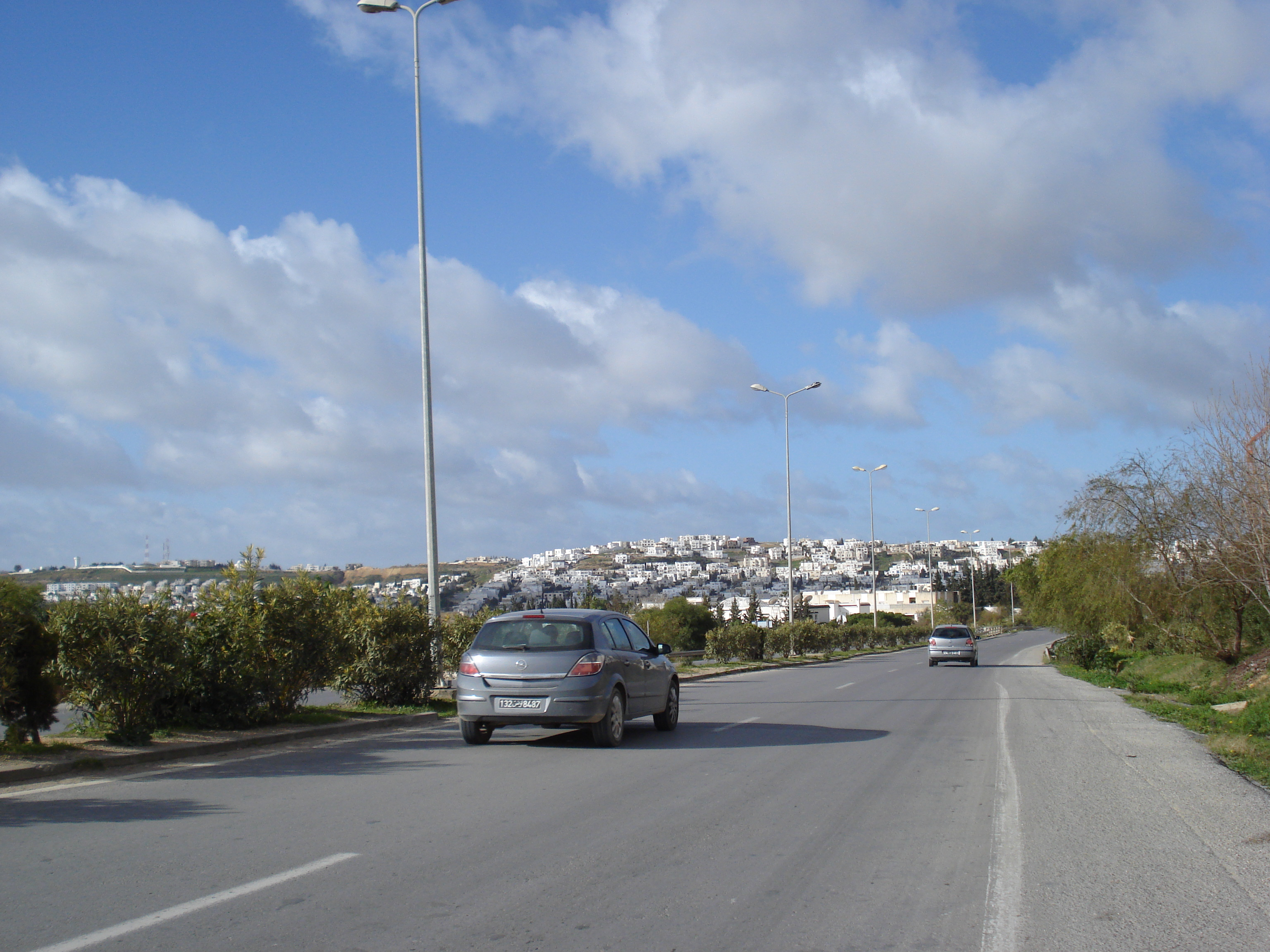 Route régionale n°25, Ennasr, Tunisie (au fond, Menzah 9)